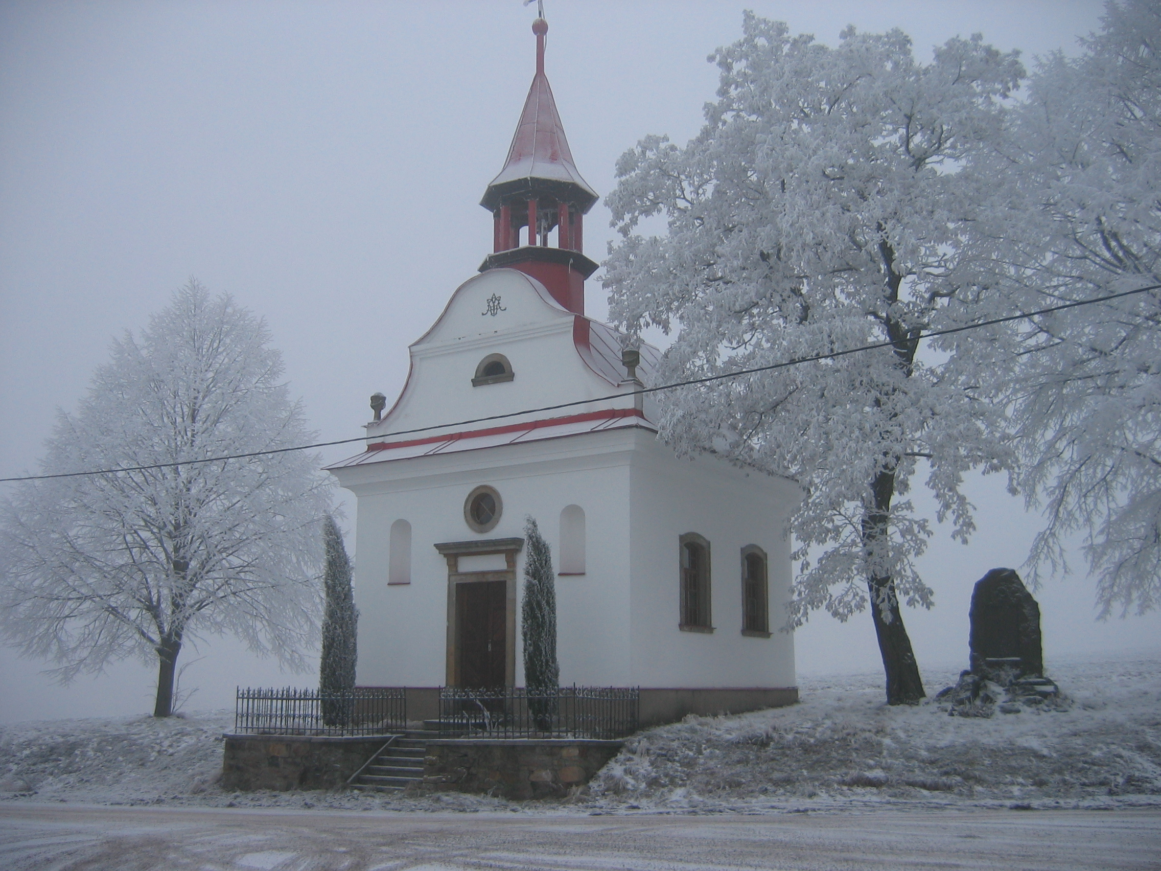 Kaple P. Marie (Prorubky), nad vsí, Prorubky, Prorubky.